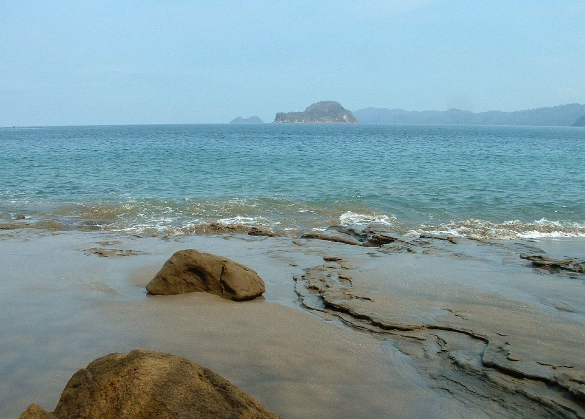 Junquillal Bay Wildlife Refuge, Guanacaste Province, Costa Rica